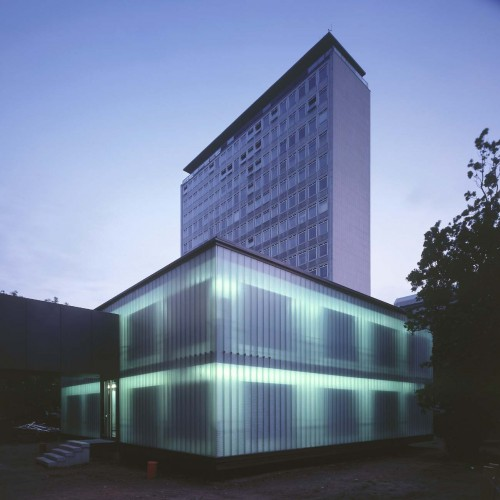 tu braunschweig